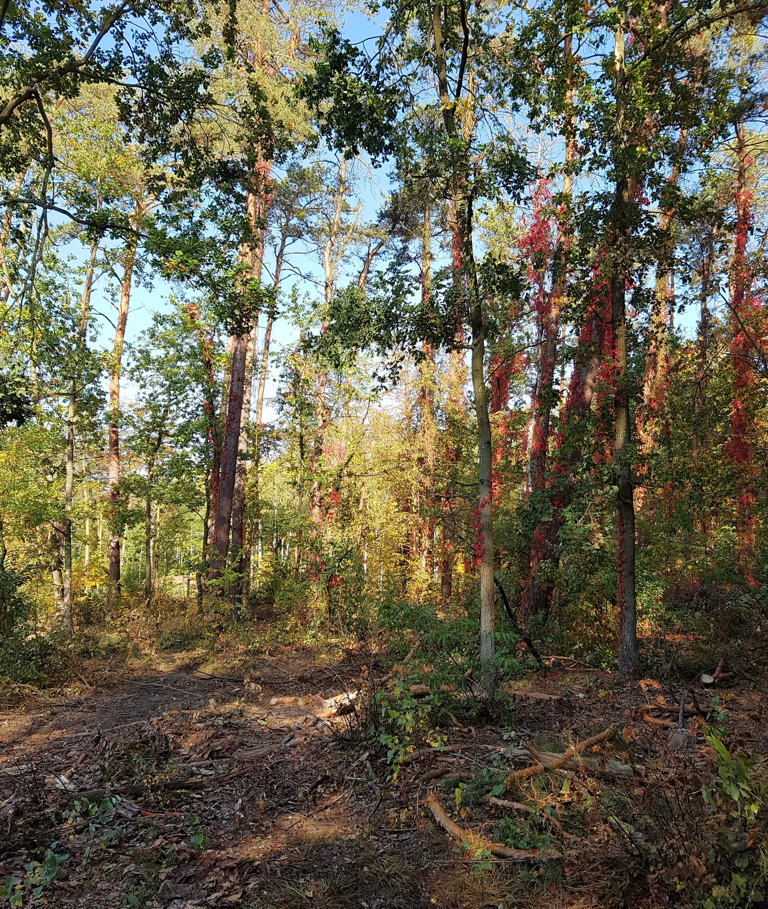 Gmina Jabłonna, Poland